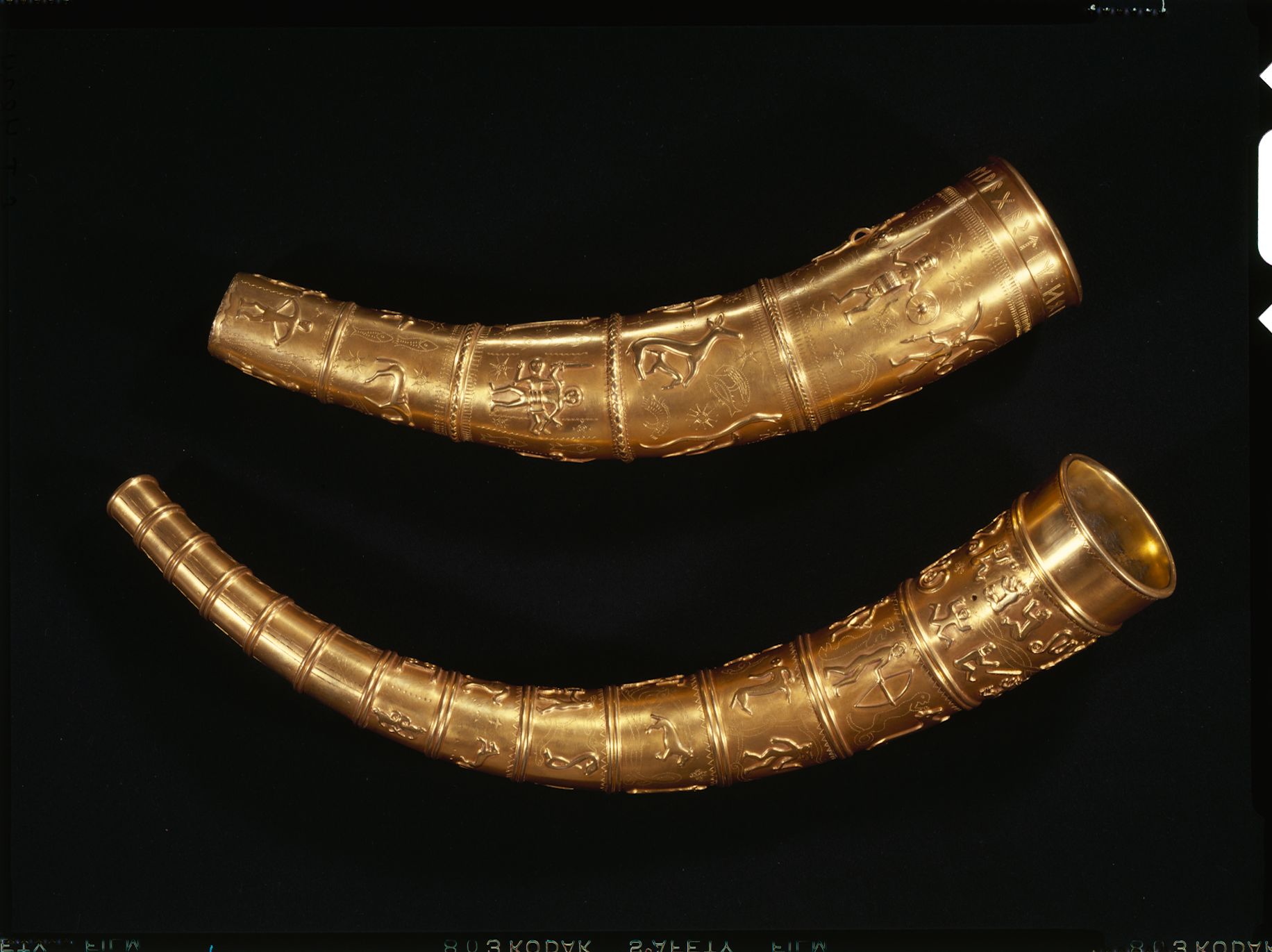 Globs/Dragsteds genskabninger af drikkehorn med tværringe.